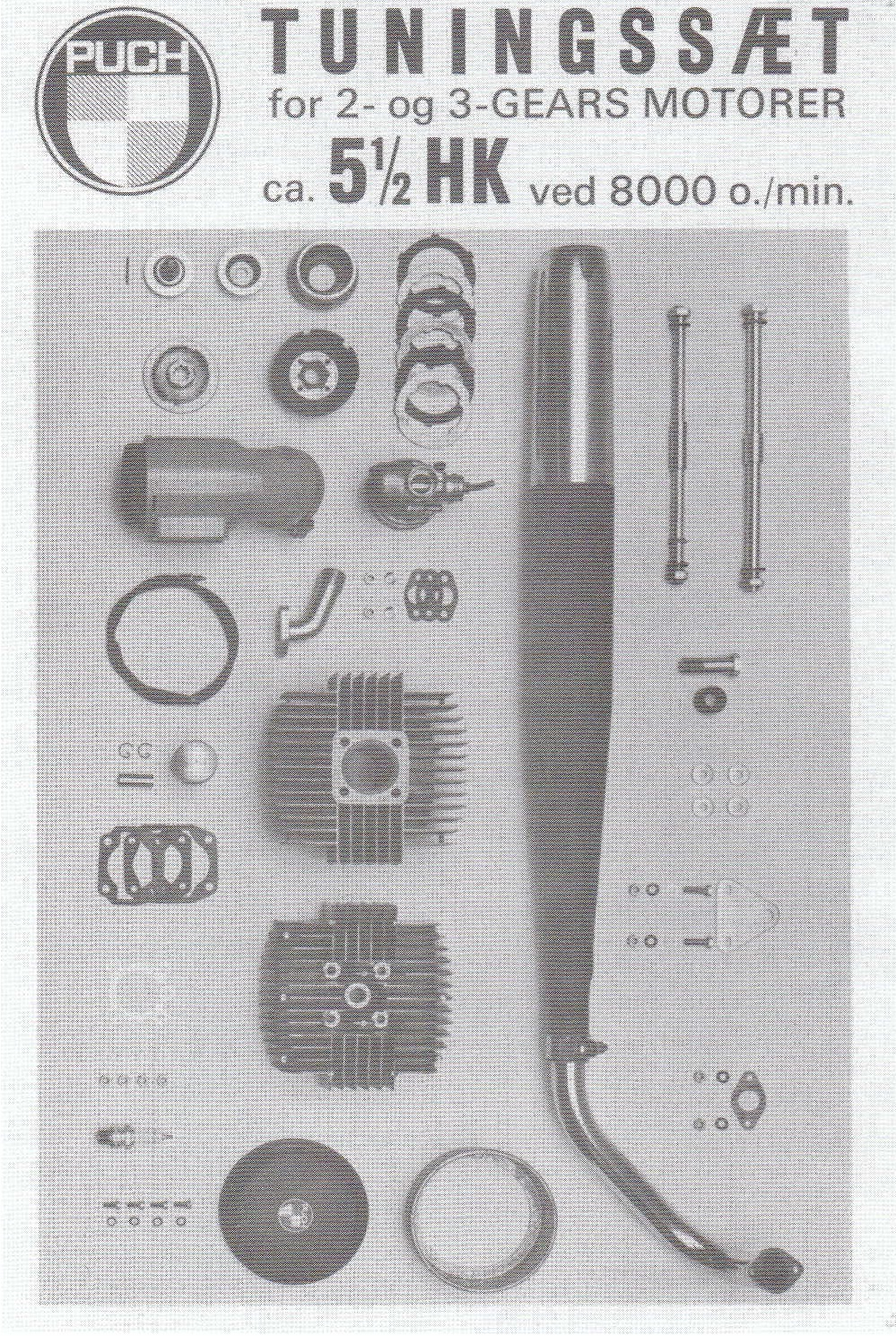 Tuningssæt til knallert